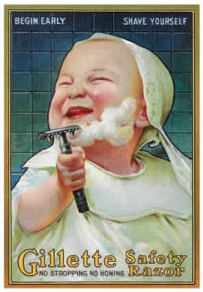 إعلان يحمل معاني السعادة، البدء مبكرا، سهولة الاستخدام، الأمان